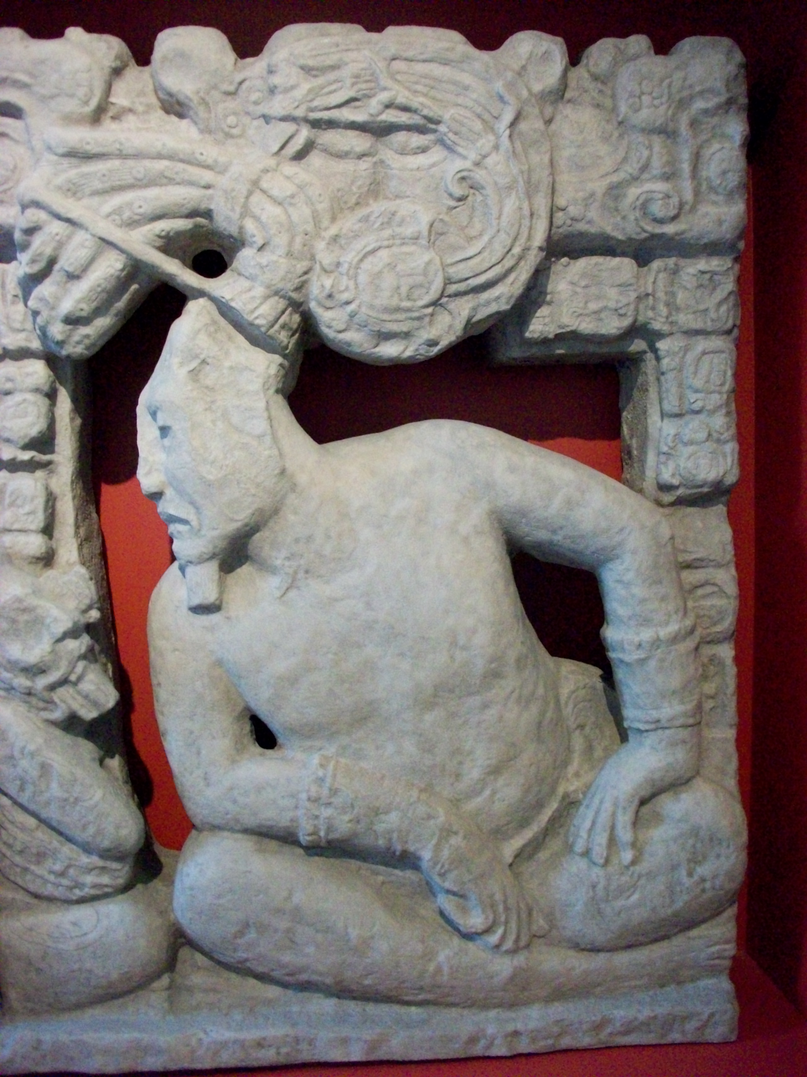 Escultura del dios maya Itzamná en la Montaña Sagrada previo a la creación del mundo. Copia de un respaldo de trono labrado en piedra caliza. Cuenca del río Usumacinta, Chiapas. Clásico tardío. Museo Amparo, Puebla.